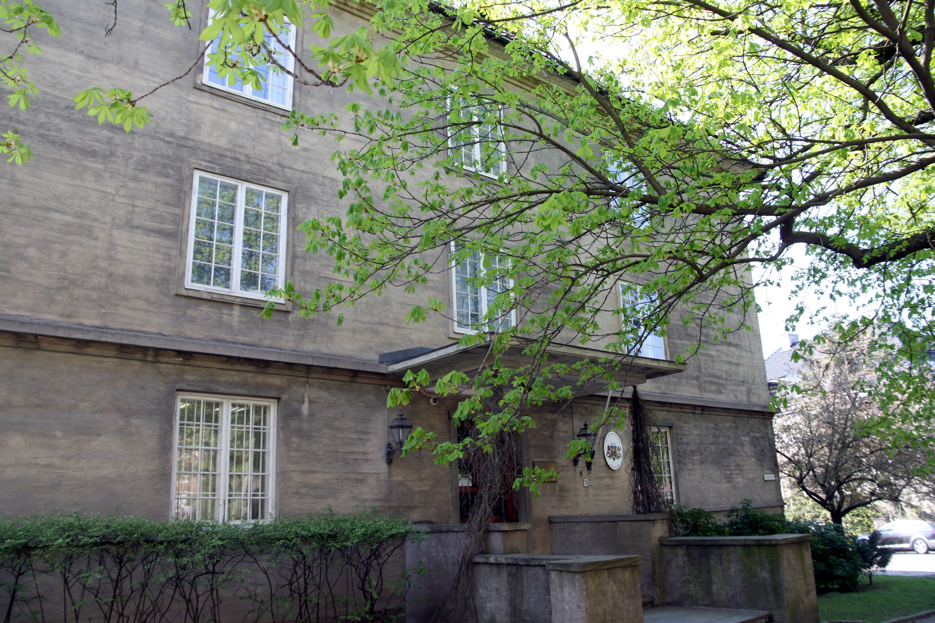 Latvias ambassade i Oslo. Bygningen har adresse Bygdøy allé 76, og har også huset blant annet aksjeklubben TA-Invest.